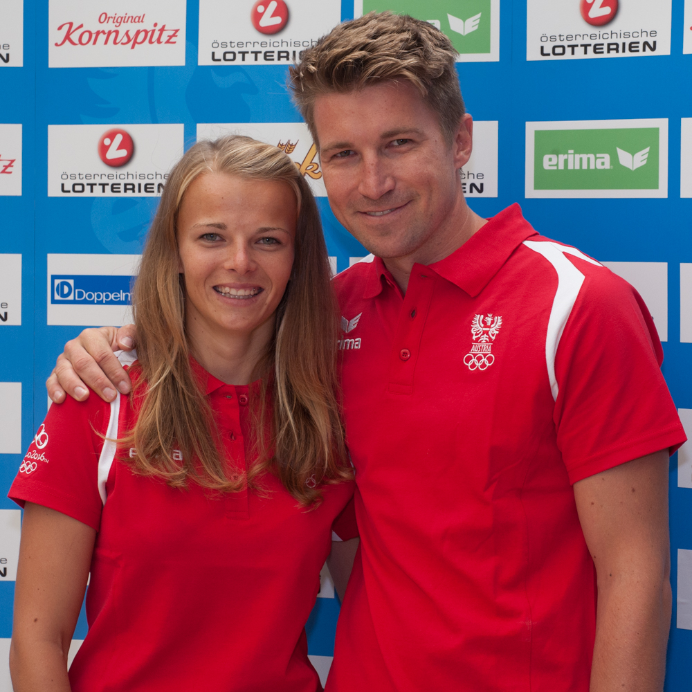 Einkleidung der Österreichischen Teilnehmer an den Olympischen Sommerspielen 2016 am 16./17. Juli 2016 in Wien. Bild zeigt Tanja Frank und Thomas Zajac.